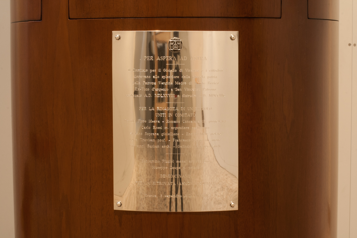 Con la realizzazione del modello in argento, sulla base è stata applicata una targa che descrive il voto e il lavoro svolto dal Comitato e quanti hanno partecipato all'operazione. Il punzone, nella parte superiore, riporta il simbolo del Comitato/Associazione "Il Gioiello di Vicenza" con il motto "Per Aspera ad Astra".